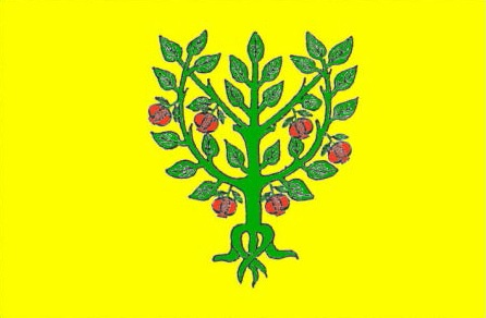 Bandera de Granyera de les Garrigues